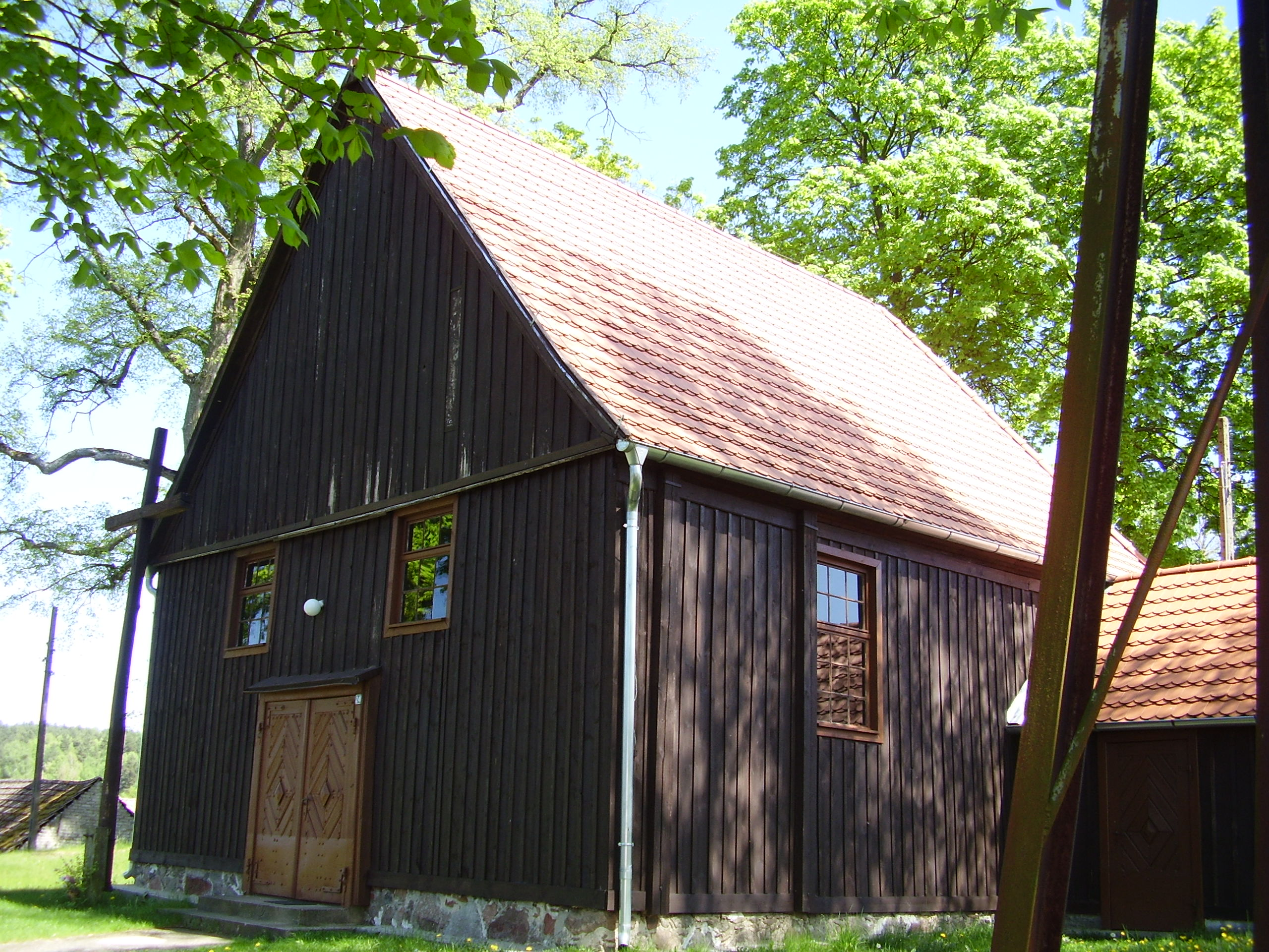 Strzaliny - rzymskokatolicki kościół filialny p.w. Nawiedzenia NMP, 1740